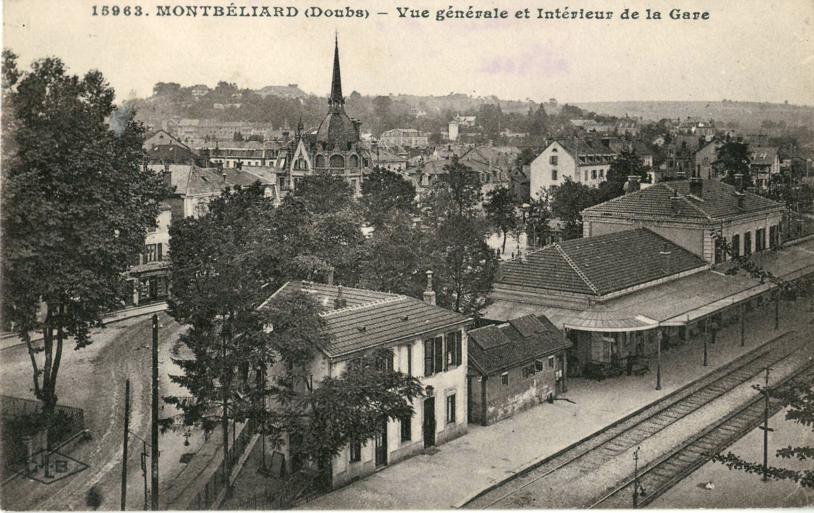 Carte postale ancienne éditée par C. L. B. n°15963 : MONTBELLIARD - Vue générale et intérieur de la Gare